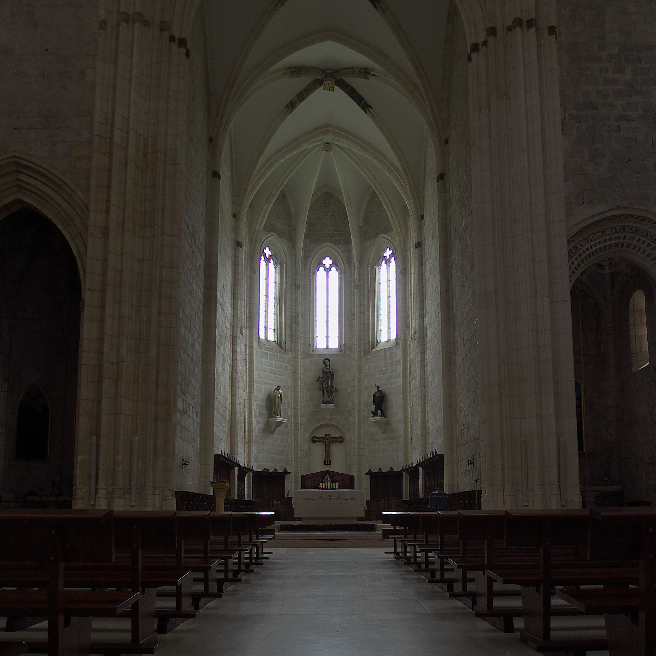 El papa Eugenio IV y el abad don Pedro, patrocinan la construcción de la iglesia (1447-1457). Atribuida a Simón de Colonia (†1511)